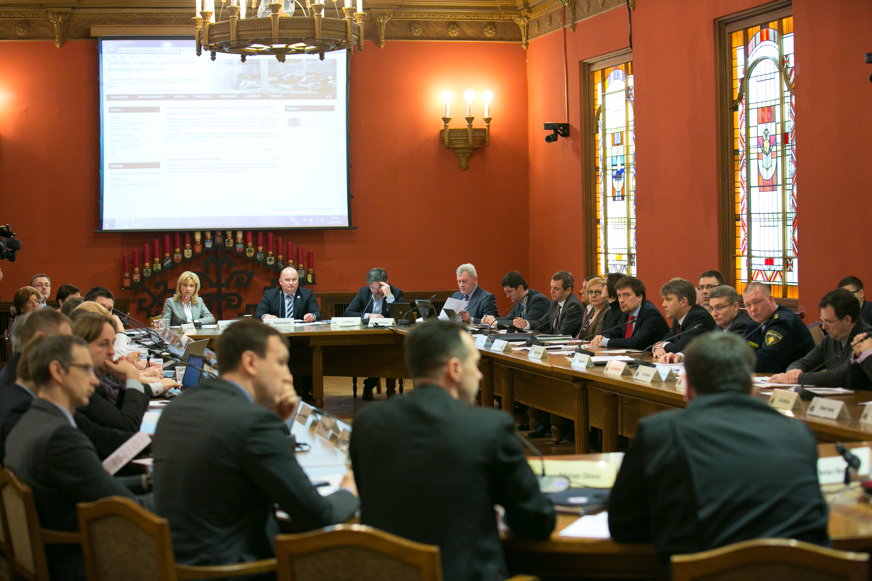 Attēlā redzama Latvijas Republikas 12. Saeimas zolitūdes traģēdijas parlamentārās izmeklēšanas komisijas 23.03.2015. sēde. Informācija par autortiesībām Foto iegūts